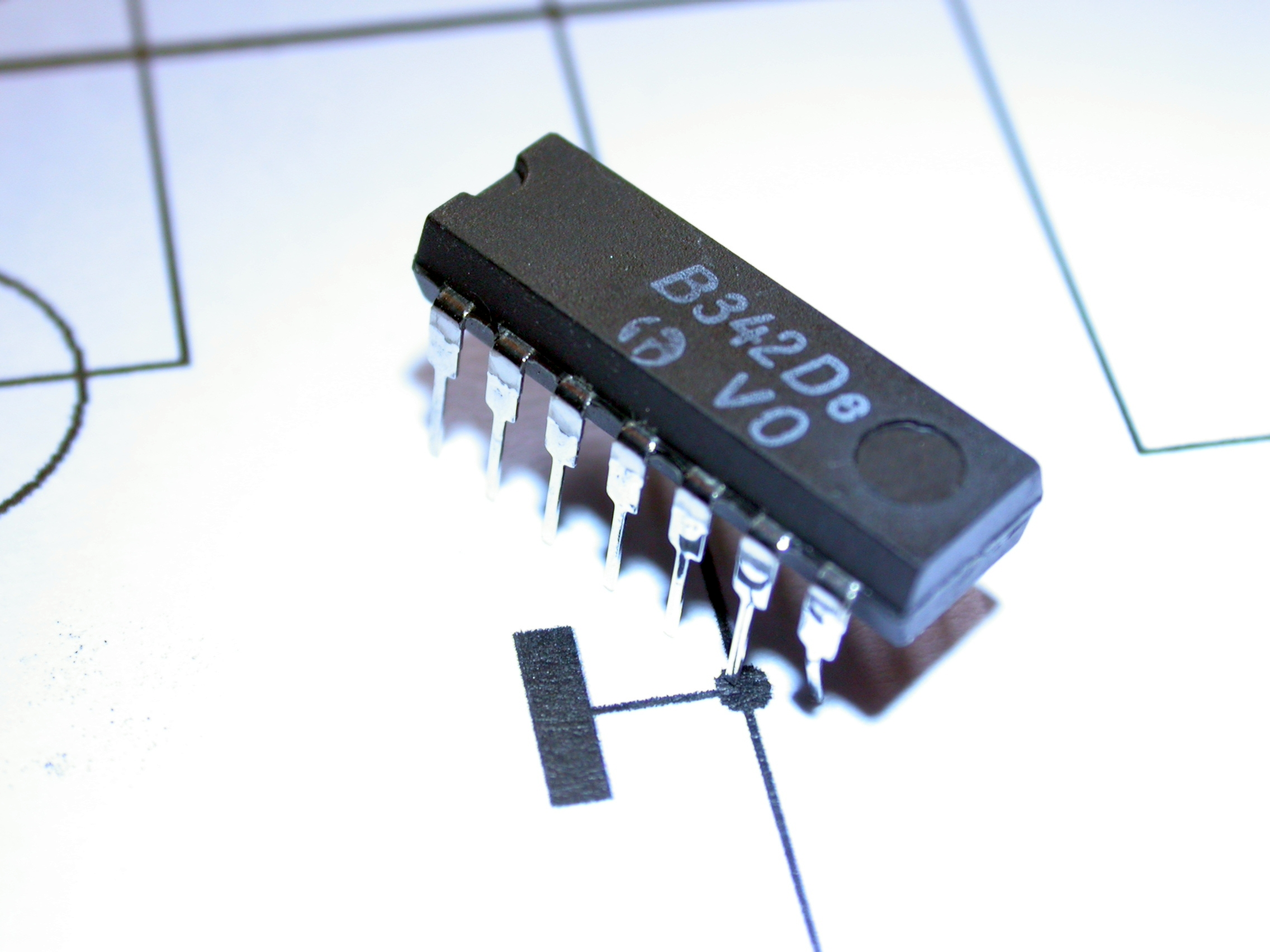 Transistor-Array B342D (4 x NPN), hergestellt 1987 im VEB Halbleiterwerk Frankfurt/Oder (HFO)